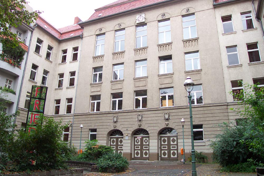 Die Albert-Schweitzer-Schule am Albert-Schweitzer-Platz